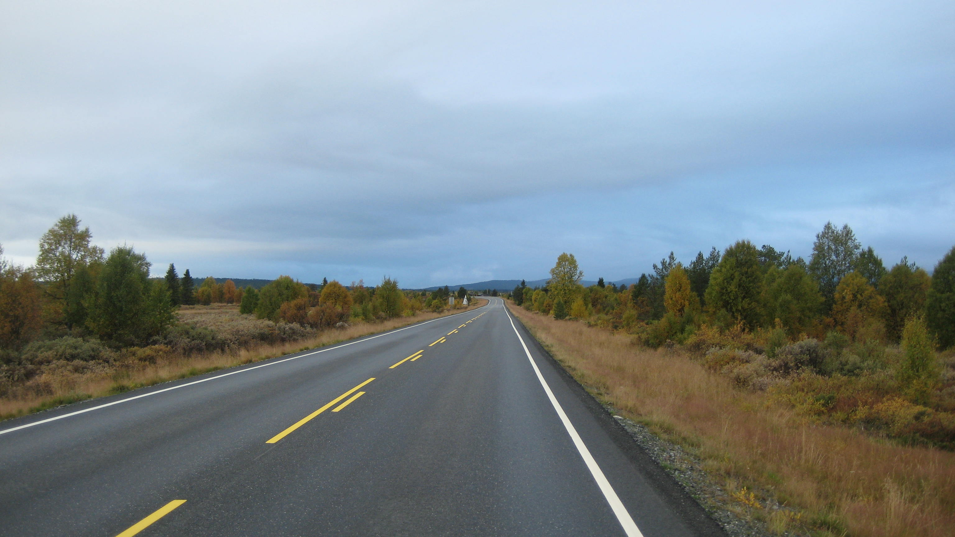 Fylkesvei 51, Golsfjellet